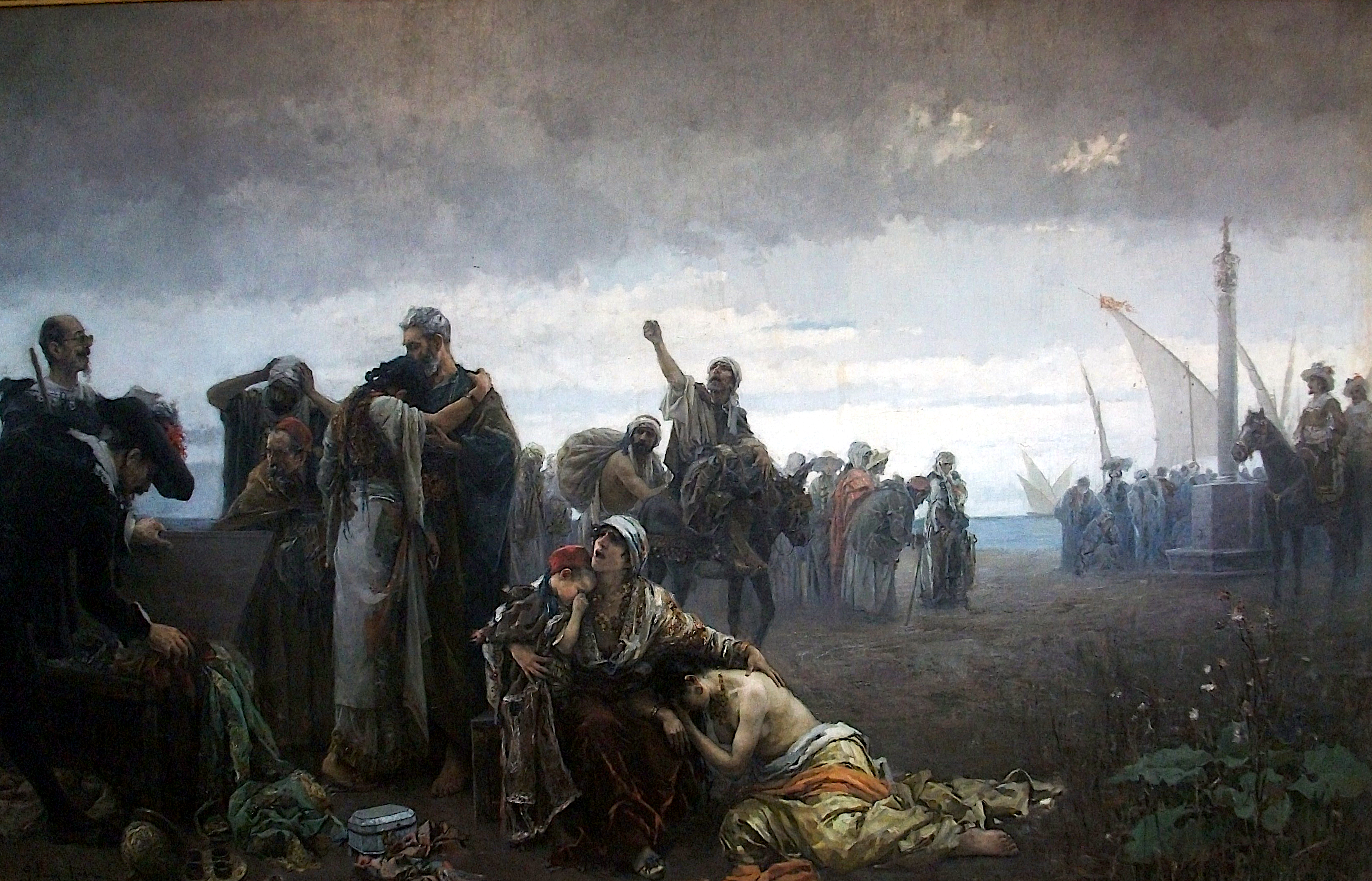 L'expulsió dels moriscos (1894), Gabriel Puig Roda (Tírig 1865-Vinaròs 1919), Museu de Belles Arts de Castelló. Oli sobre llenç, 355 x 556 cm.